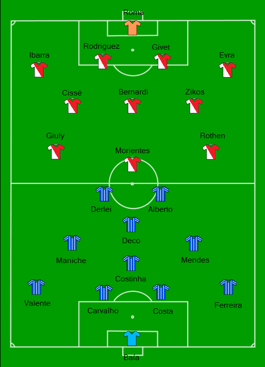 Finale de la Ligue des Champions 2004. AS Monaco (blanc et rouge) et FC Porto (bleu)Unknown